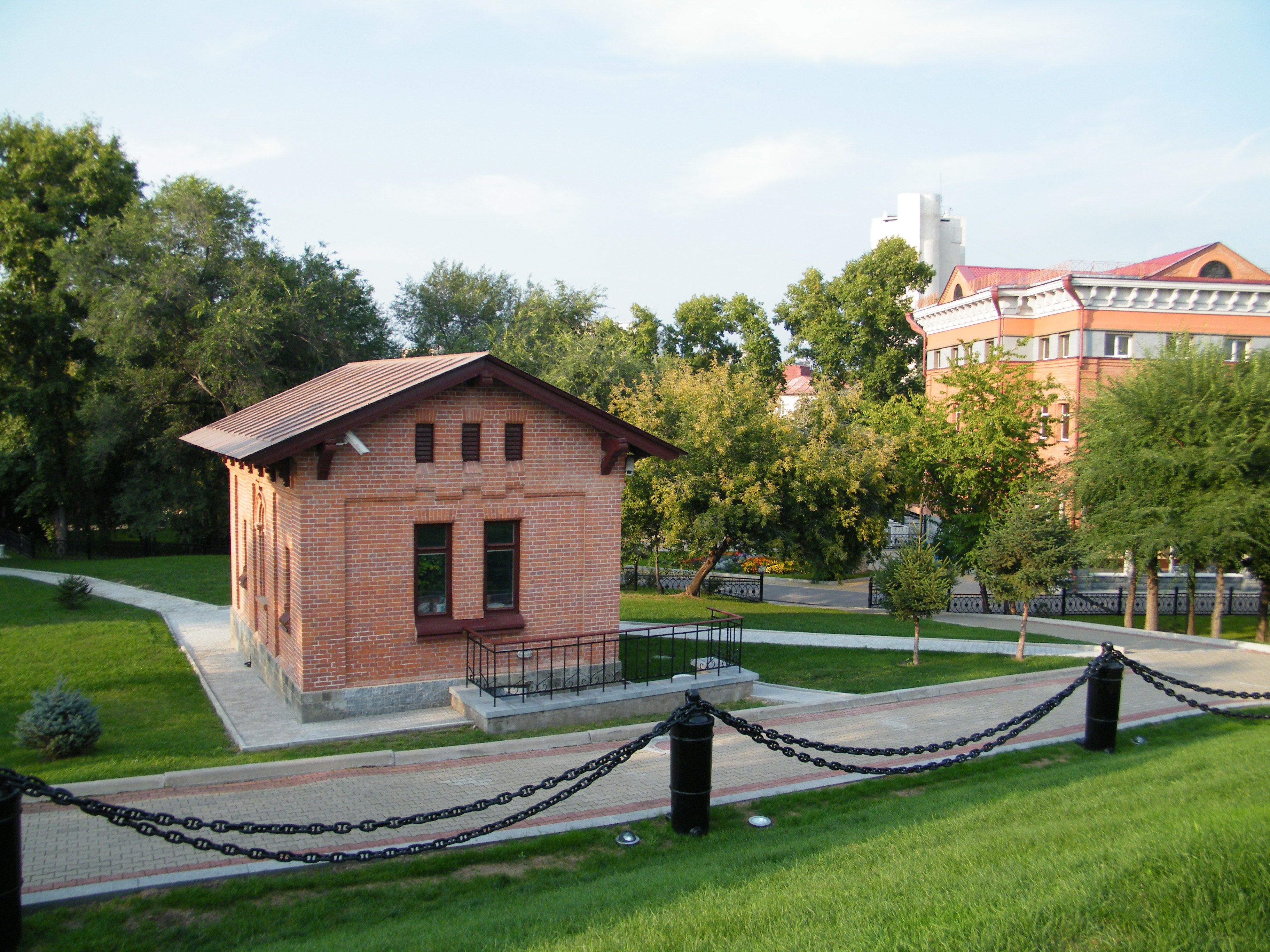 Дом караула у памятника Муравьеву-мурскому в Хабаровске